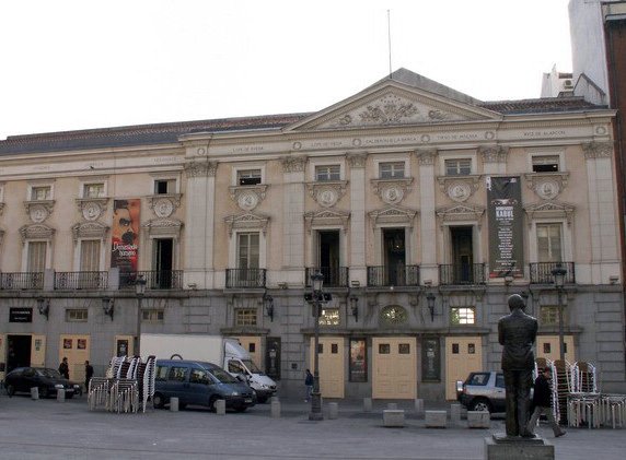 Vista de la fachada del Teatro Español, en la Plaza de Santa Ana, Madrid.